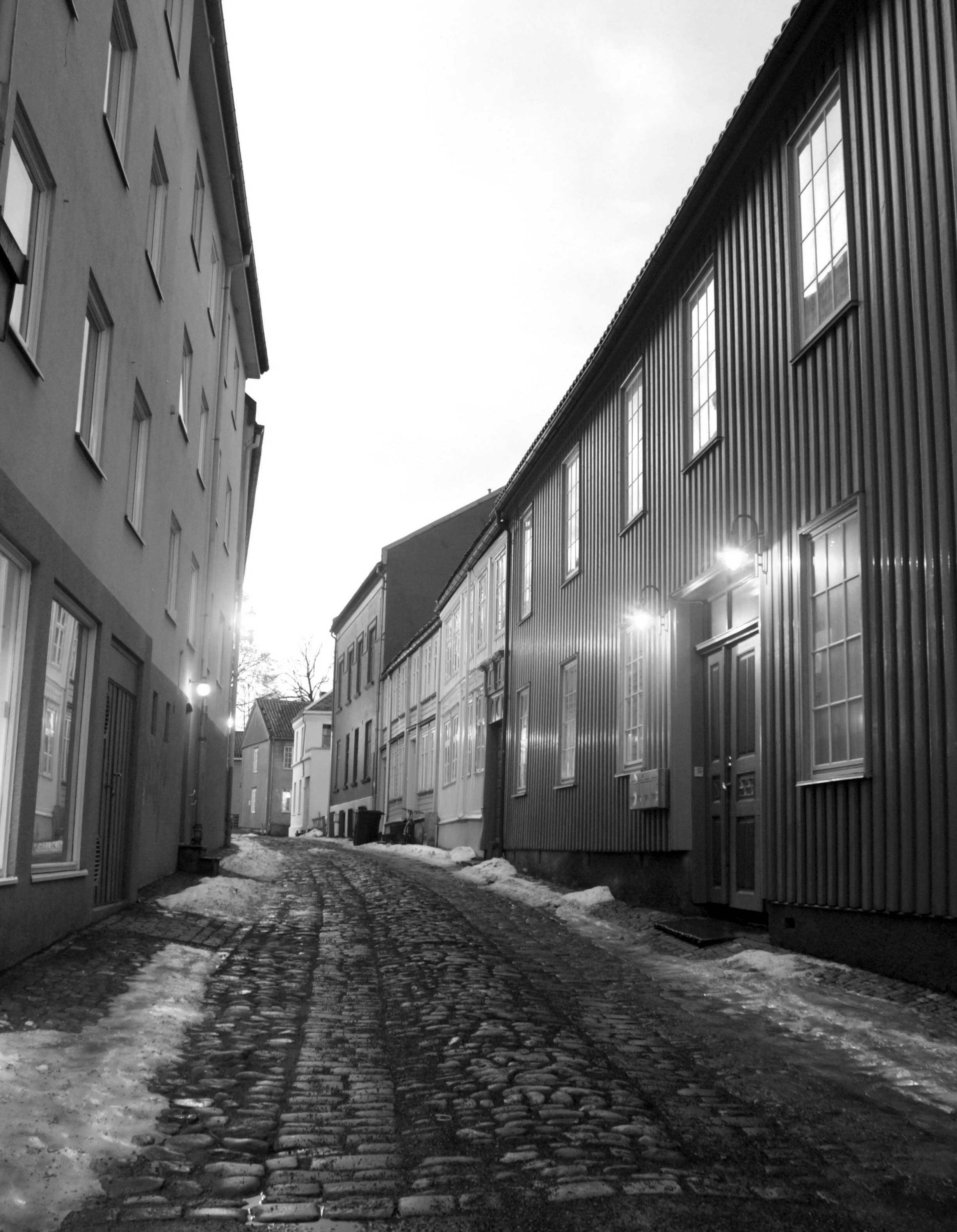 View of Kannikestrete, a "veit"(=narrow street) in Trondheim, Norway